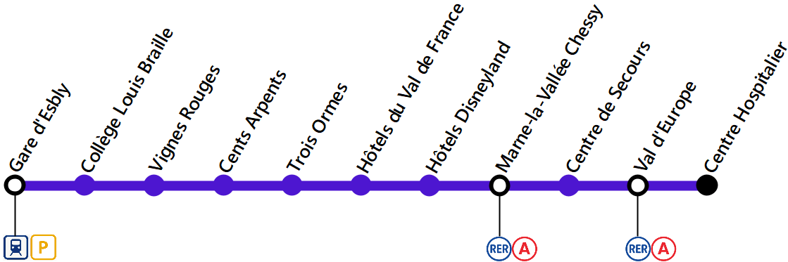 Plan de la ligne de bus EVE sous le modèle d'Île de France Mobilités